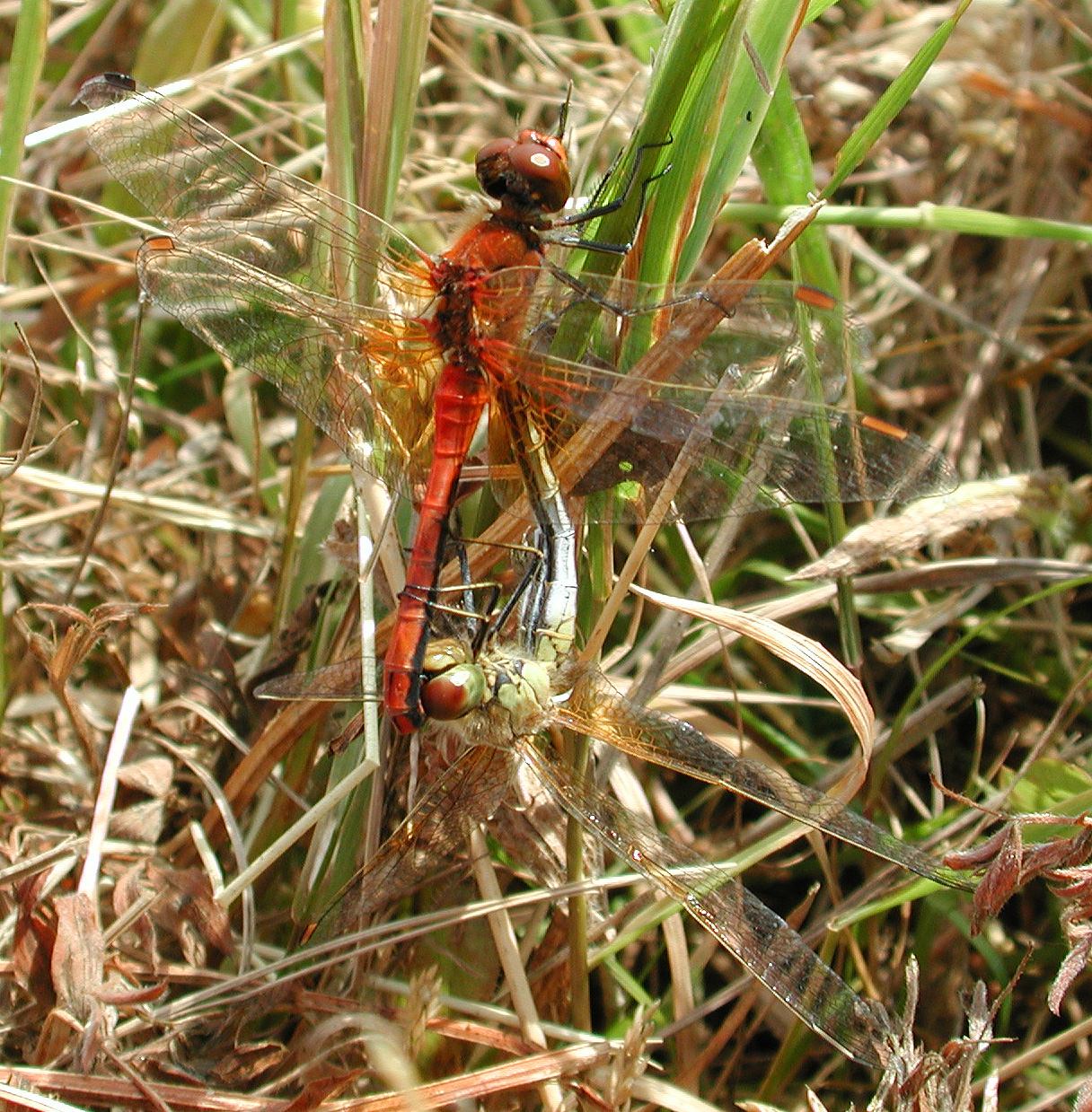 Sympetrum flaveolum, pairing, Gefleckte Heidelibelle bei der Paarung, NSG Kirchwerder Wiesen, Elbmarsch bei Hamburg, Deutschland